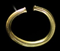 Ein Armring aus dem Fürstengrab von Leubingen. Exponat der Dauerausstellung im Landesmuseum Halle mit frdl. Genehmigung des Museums aufgenommen.